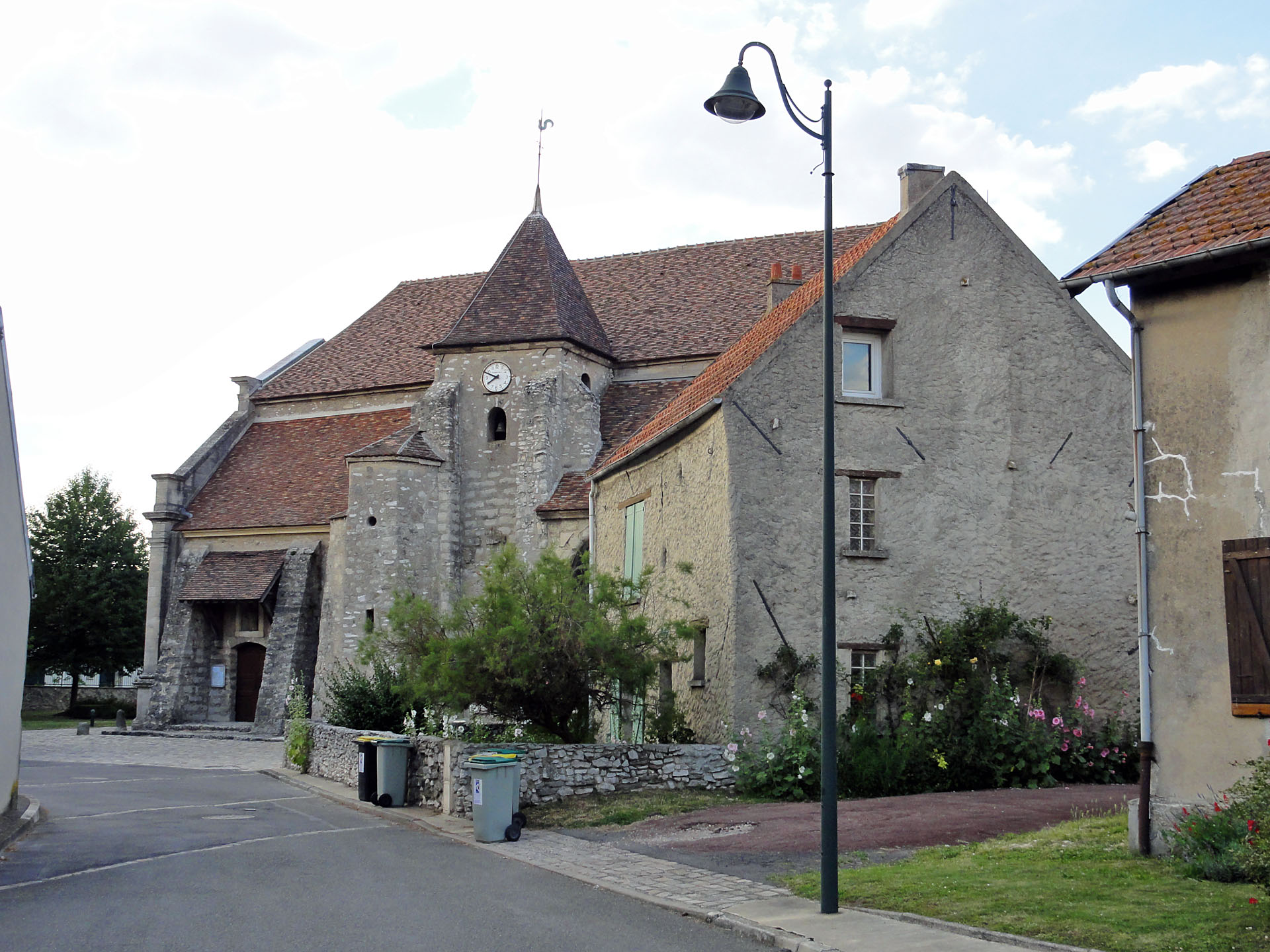 L'église Notre-Dame-de-l'Assomption au Plessis-Gassot, Val-d'Oise, France.